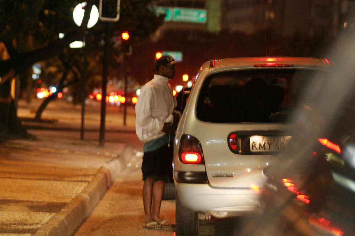 Especial - Assaltos a motoristas na Av. Atlântica com Siqueira Campos, Copacabana. Foto - Andréa Farias / Ag. O Dia IMAGEM DIGITAL